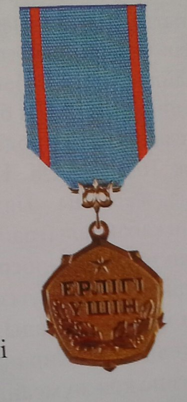 Қазақша (кирил): "Ерлігі үшін" медалі